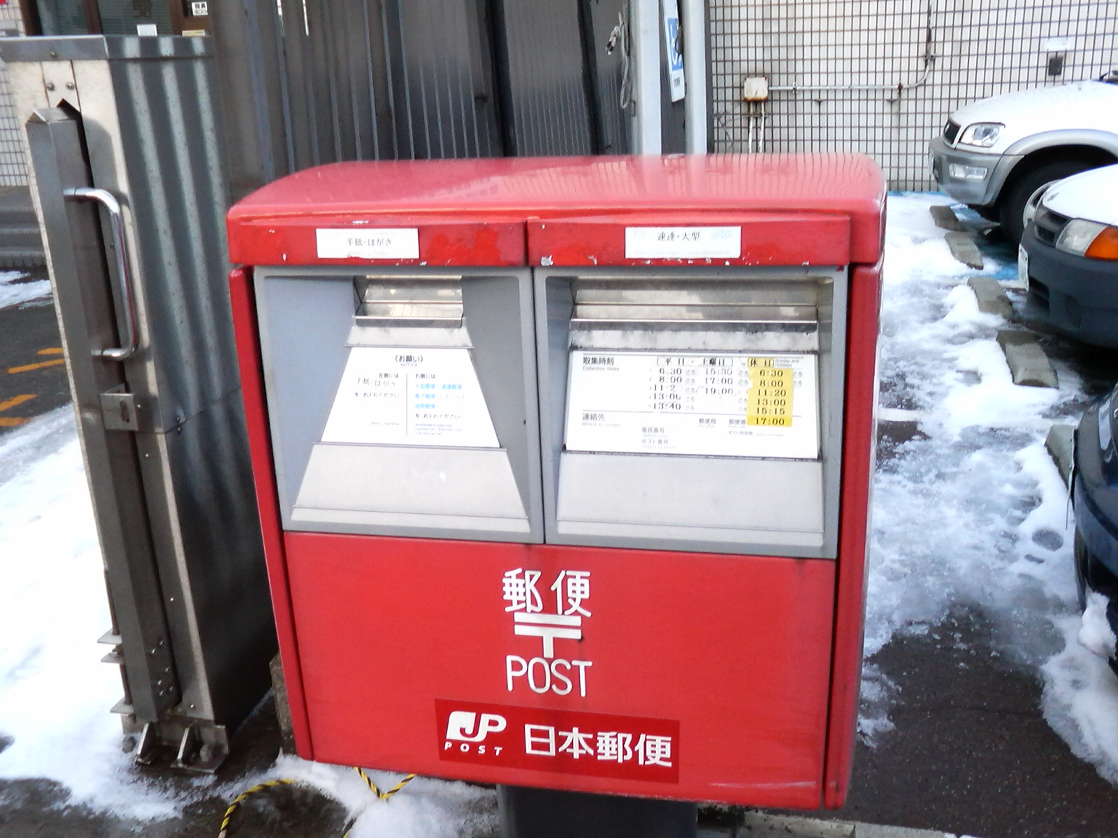 酒田郵便局前の郵便ポスト（郵便差出箱13号。松下電器産業製造）